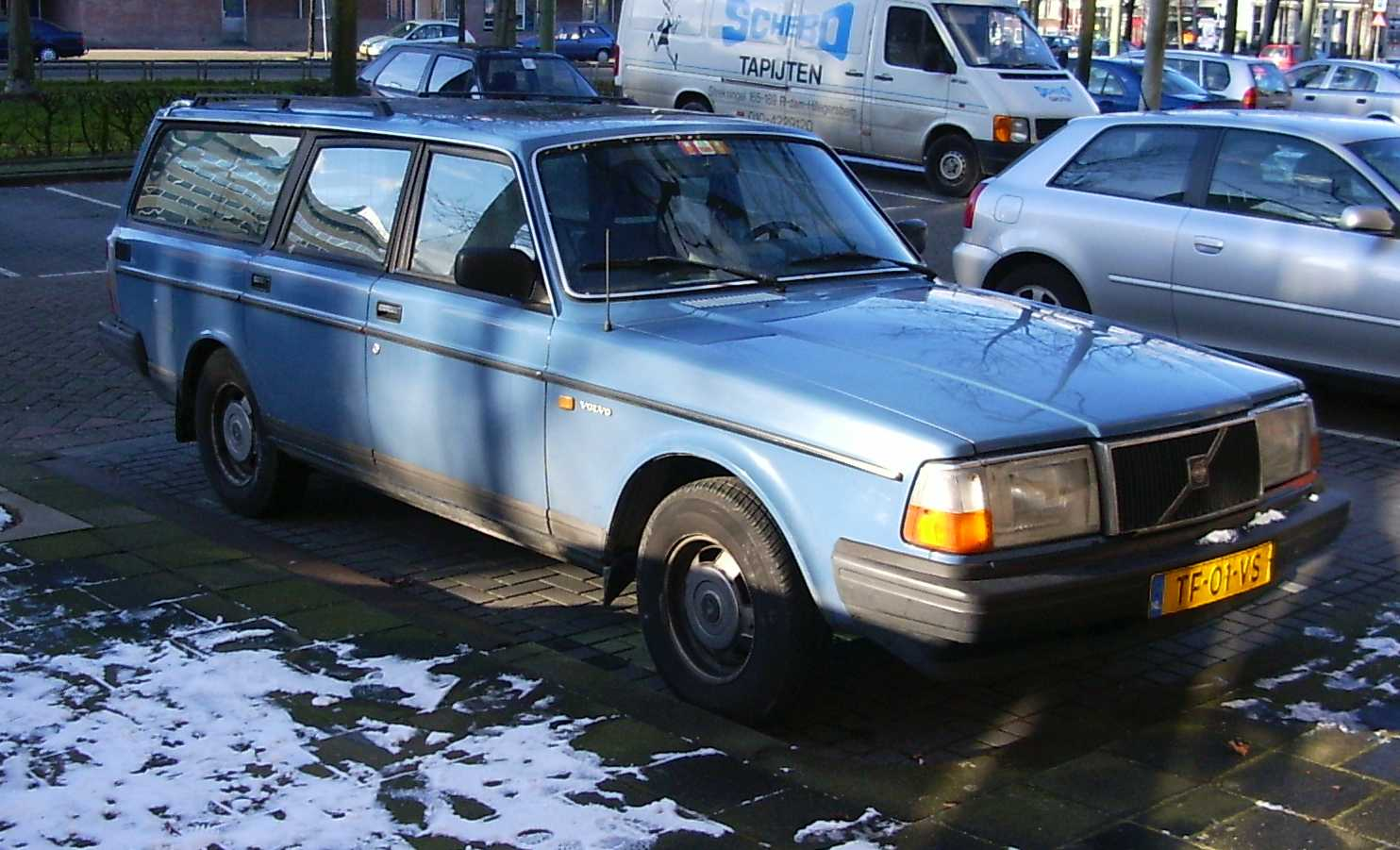 En Volvo 245 från omkring 1988.